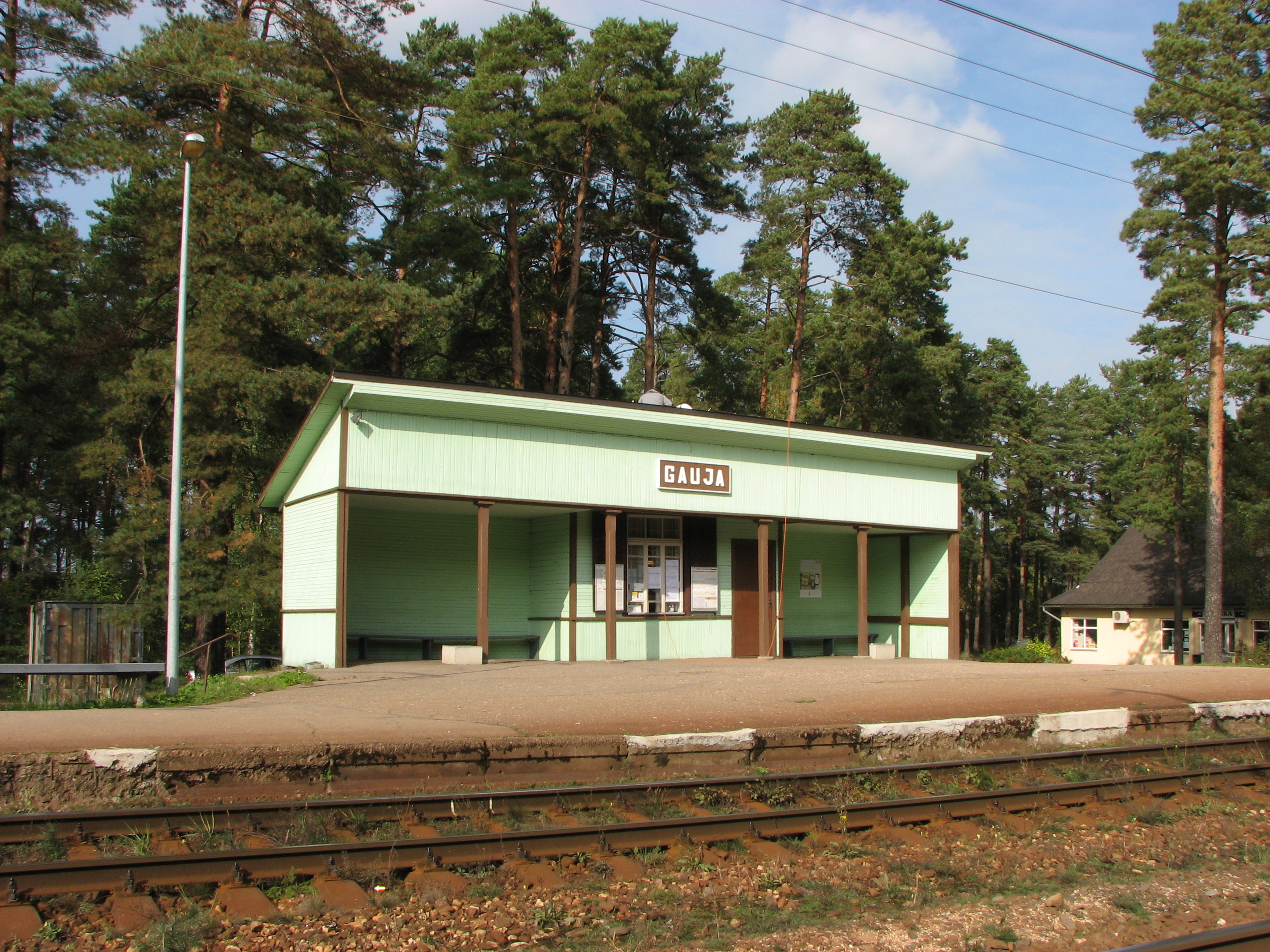 Gauja railway station, Latvia. Пассажирский павильон остановочного пункта Гауя.